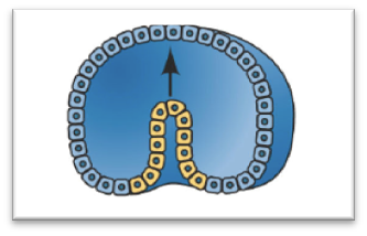 Invaginación Blastula